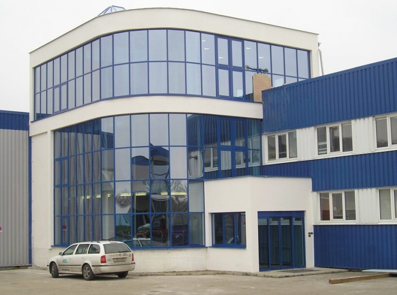 Frujo na konci Tvrdonic